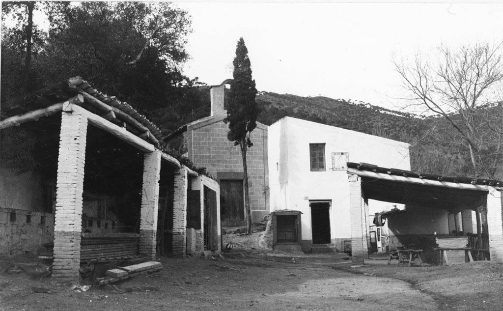 Vista general de Sant Cebrià i Santa Justina. Juli Vintró i Casallachs (Entre 1890 i 1911)